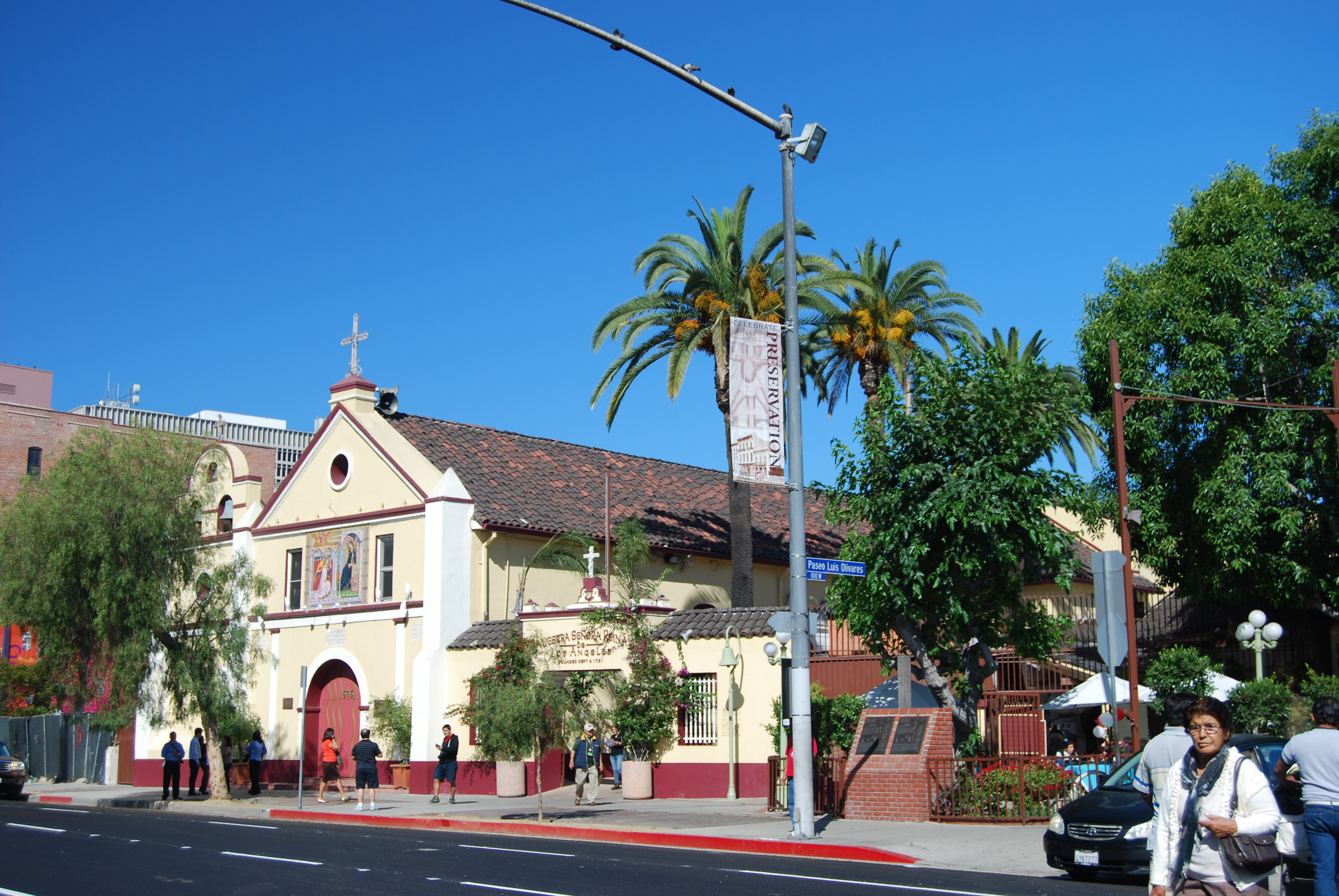 Nuestra Señora Reina de Los Angeles